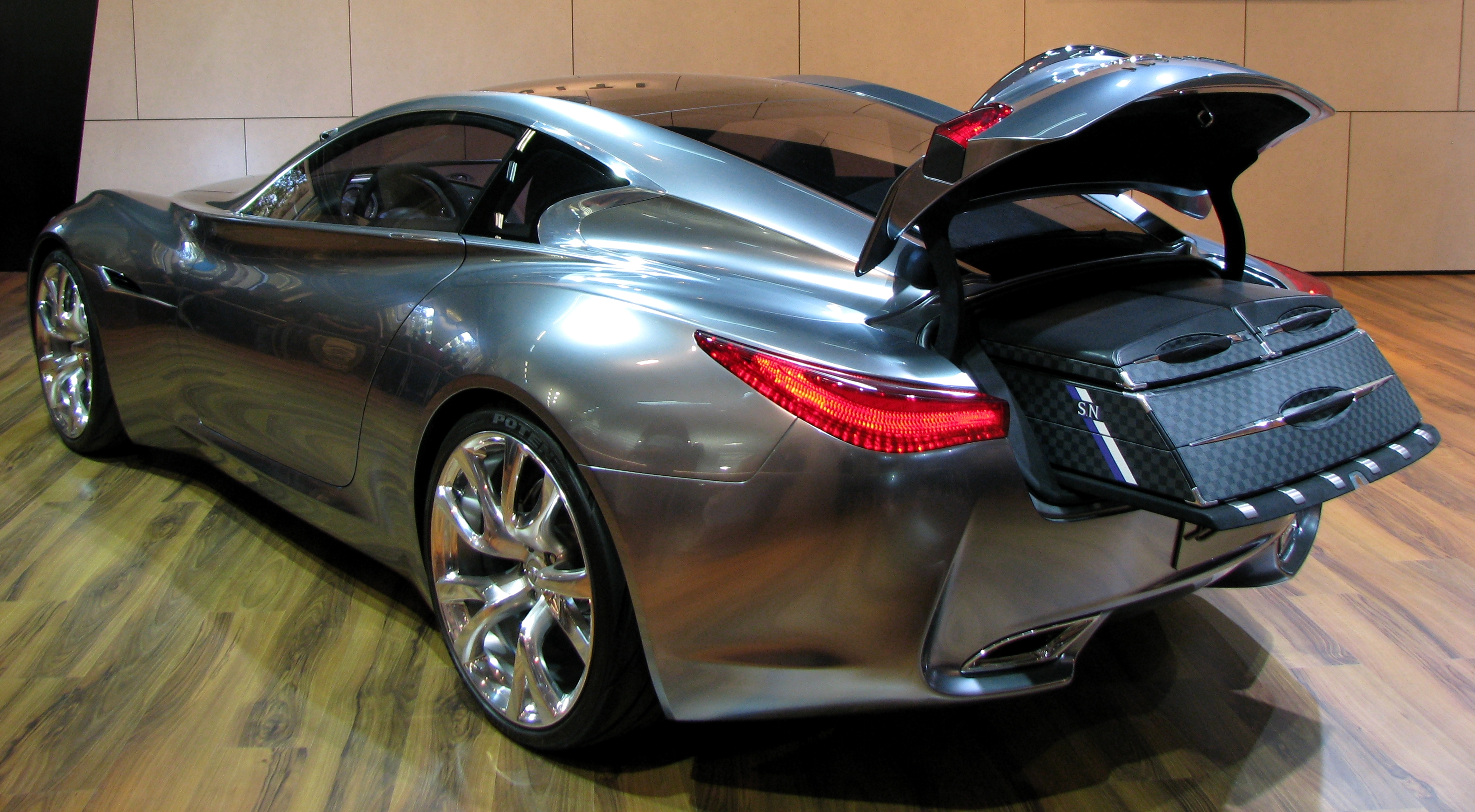 Prototipo Infiniti Essence en el Salón Internacional del Automóvil de Barcelona 2009.